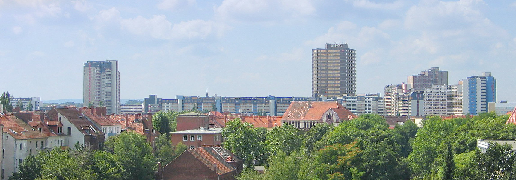 Gesamtansicht des Ihmezentrums in Hannover, Deutschland, von Osten aus gesehen.